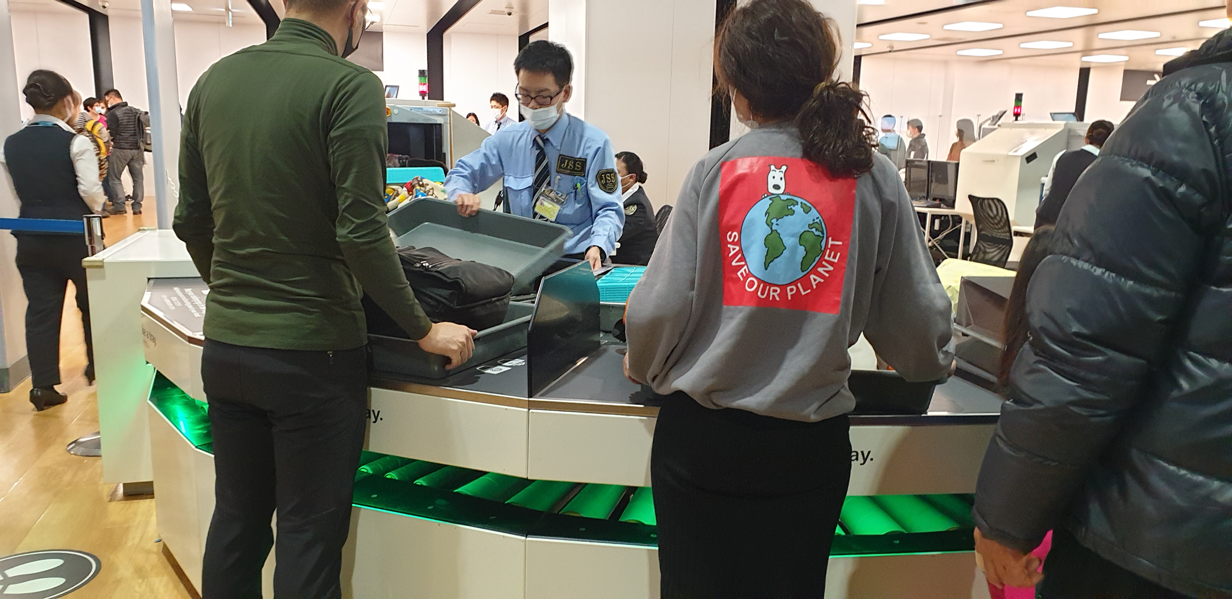 Japan 2020